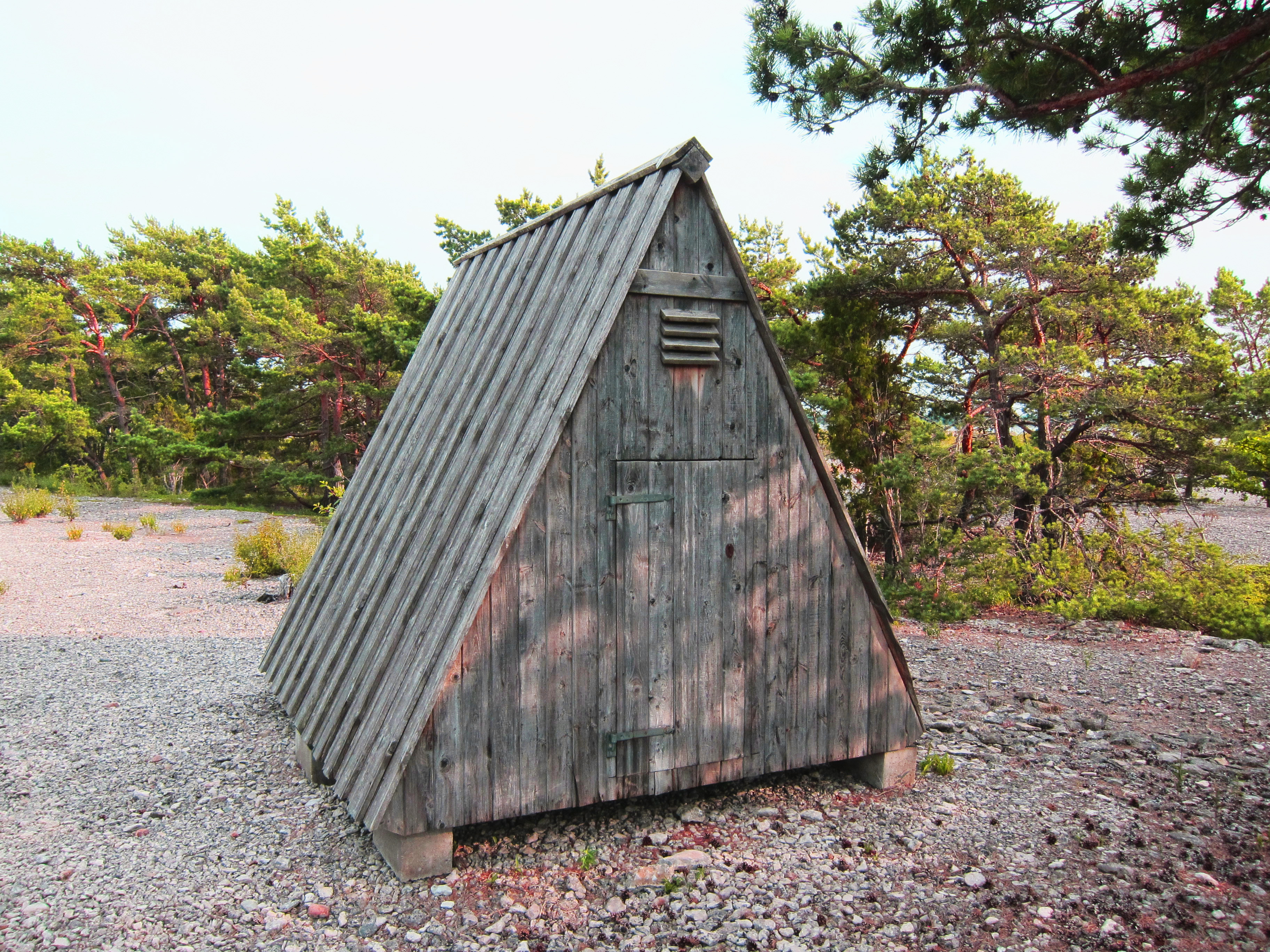 Bläse kalkbruksmuseum (Produktionsmuseum). Gotland, Bläse